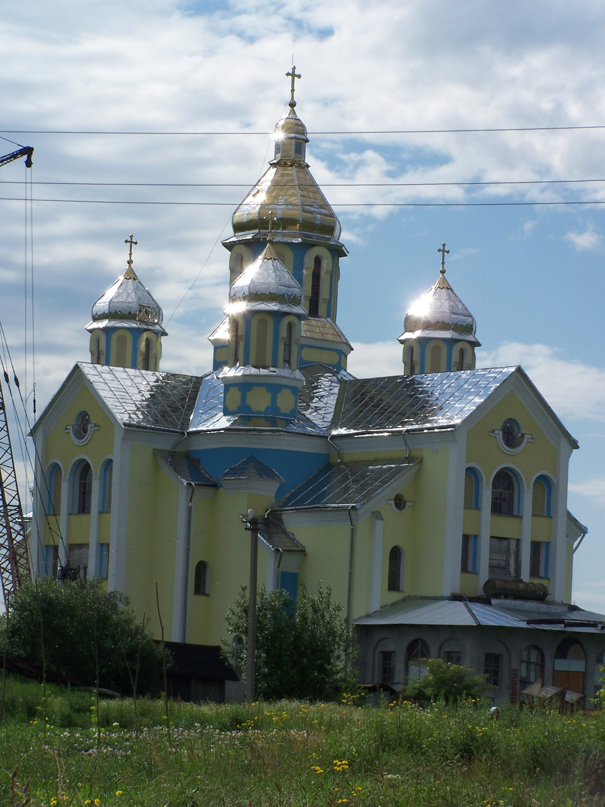 Stebnyk